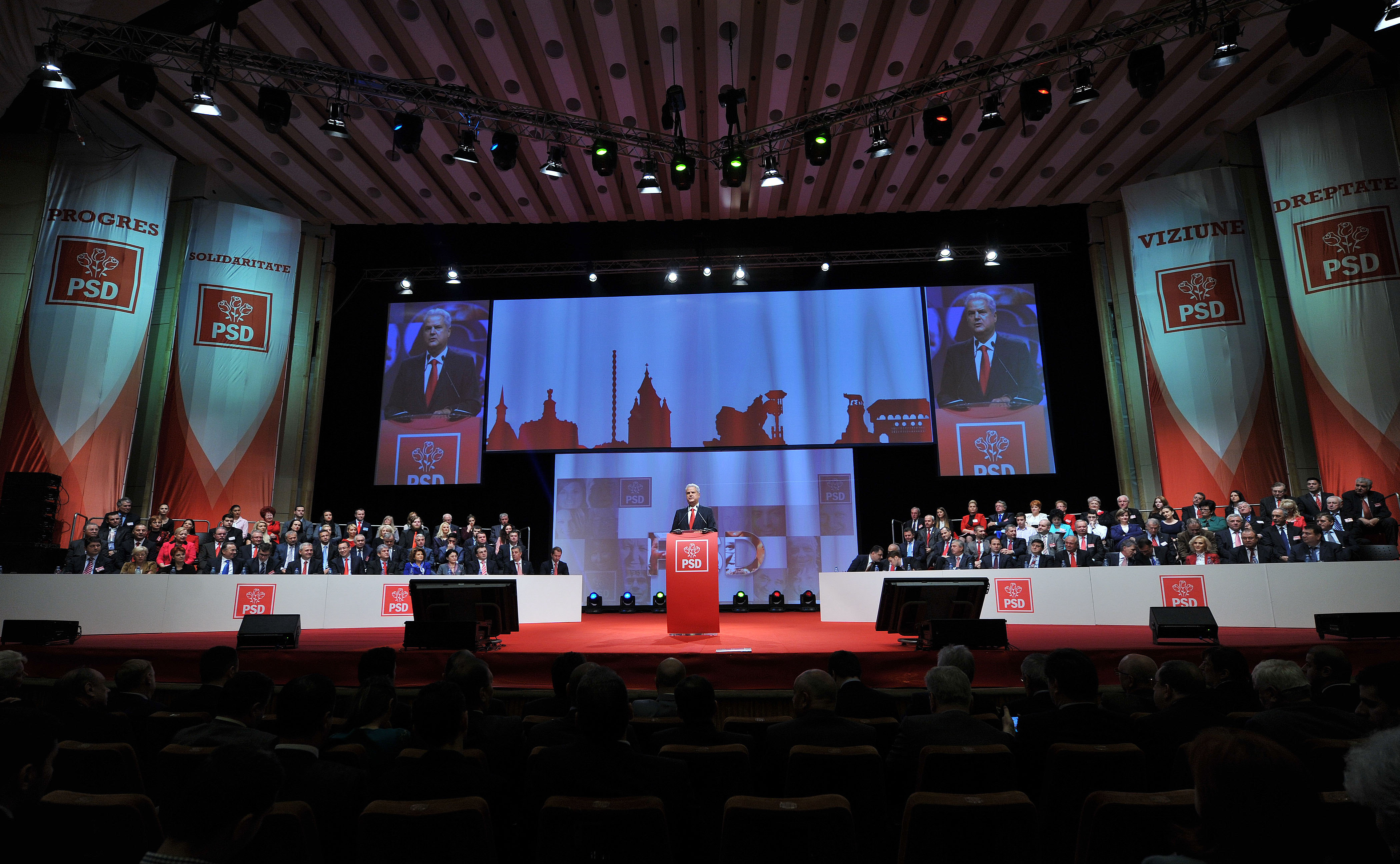 Adrian Nastase la Consiliul National al PSD